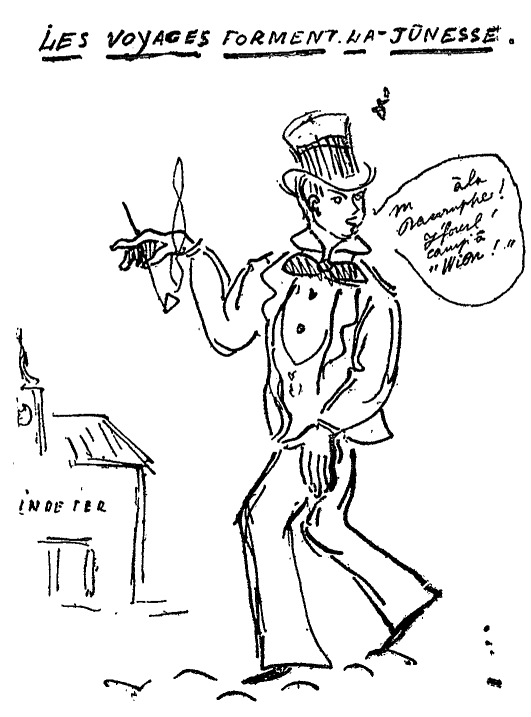 Dessin de Paul Verlaine (1844-1896) : Les voyages forment la jeunesse